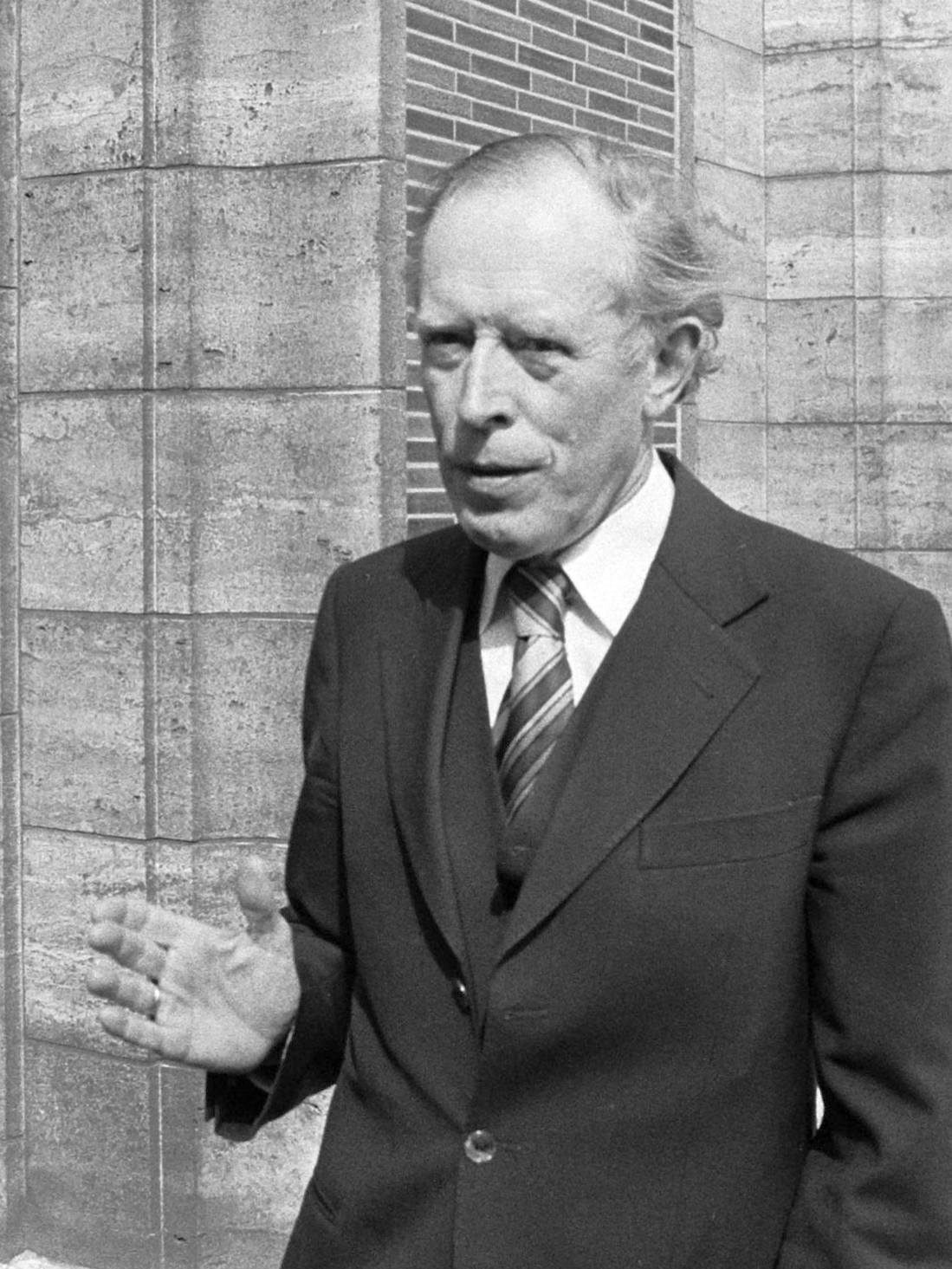 Mr. Van Heijningen, advocaat van Pieter Menten, voor het gebouw van de Hoge Raad voor de uitspraak over de vervolging van de oorlogsmisdadiger Pieter Menten 22 mei 1979